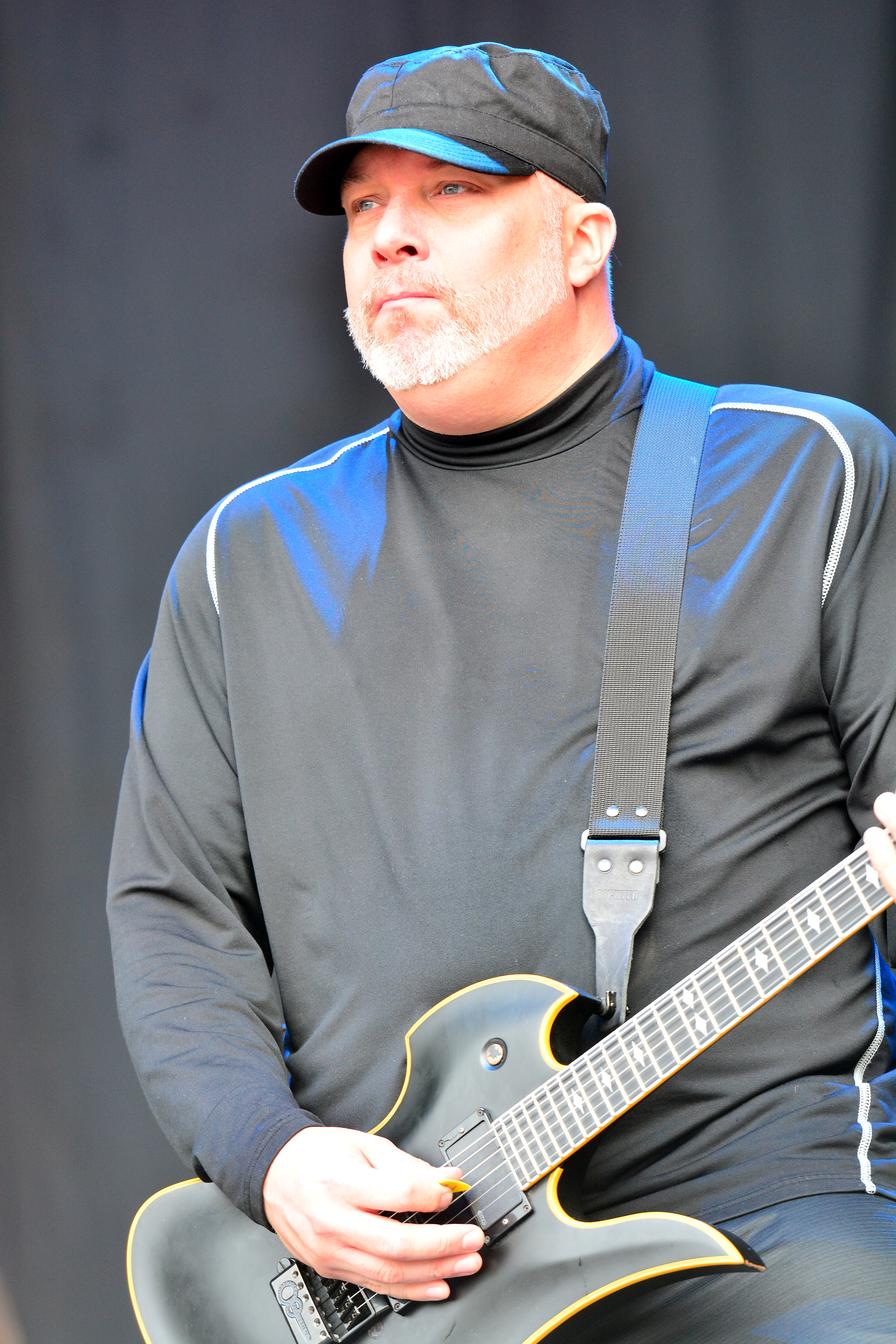 Madball beim Reload Festival 2015